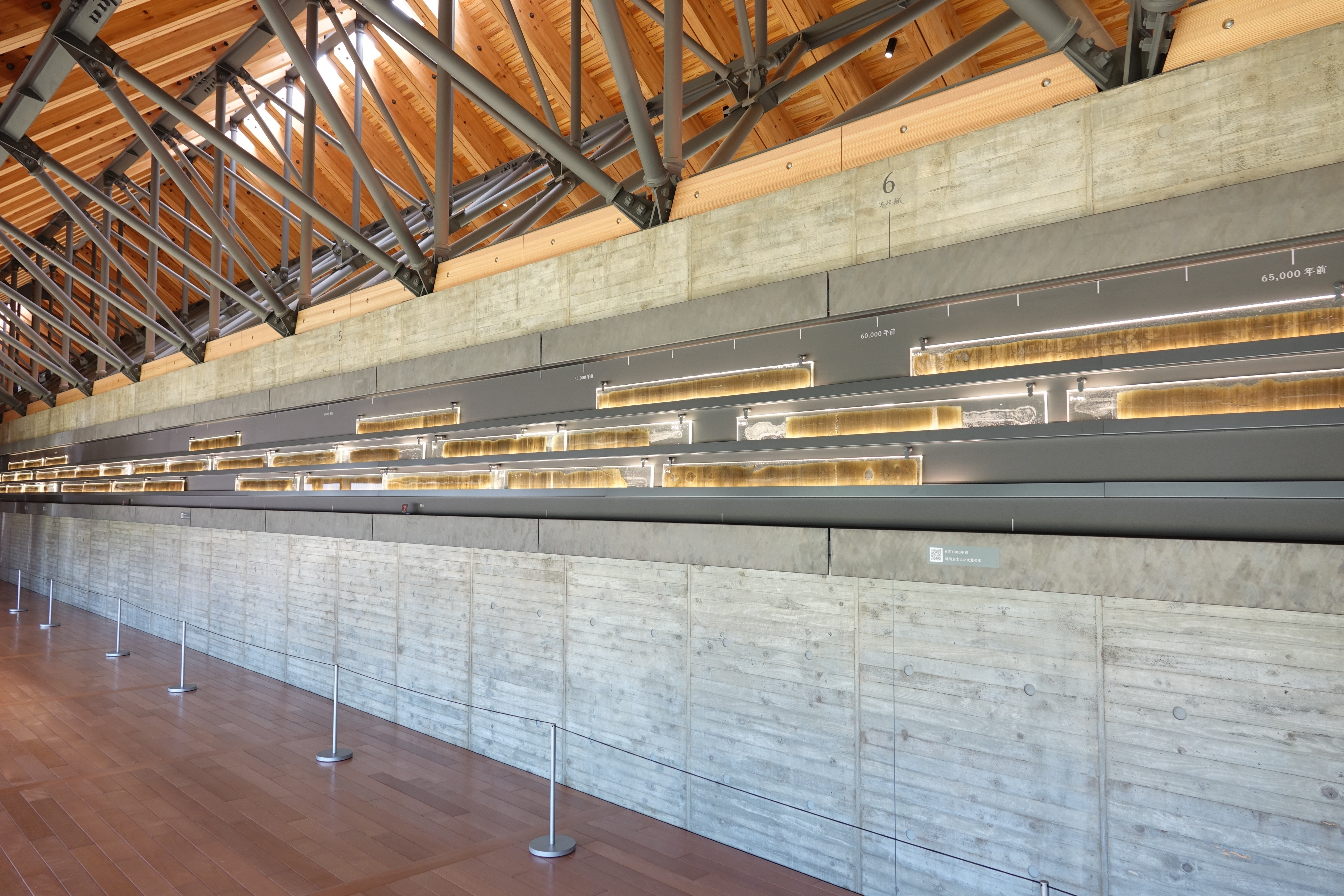 連続した水月湖の年縞 福井県、年縞博物館